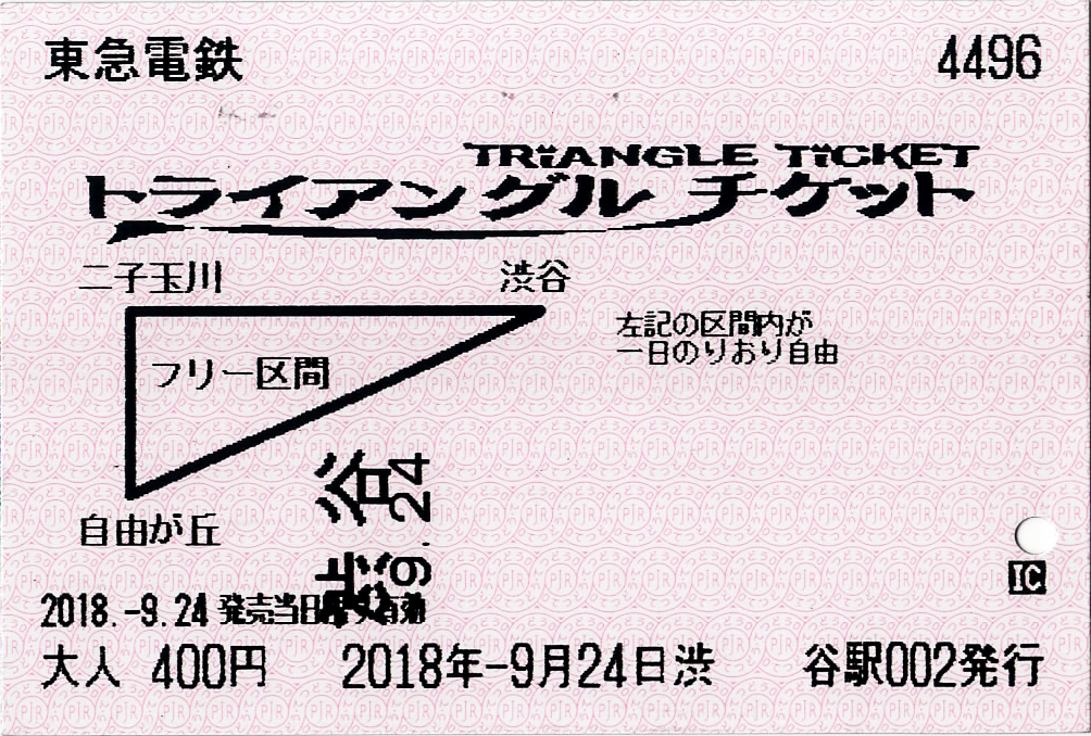 東京急行電鉄 トライアングルチケット